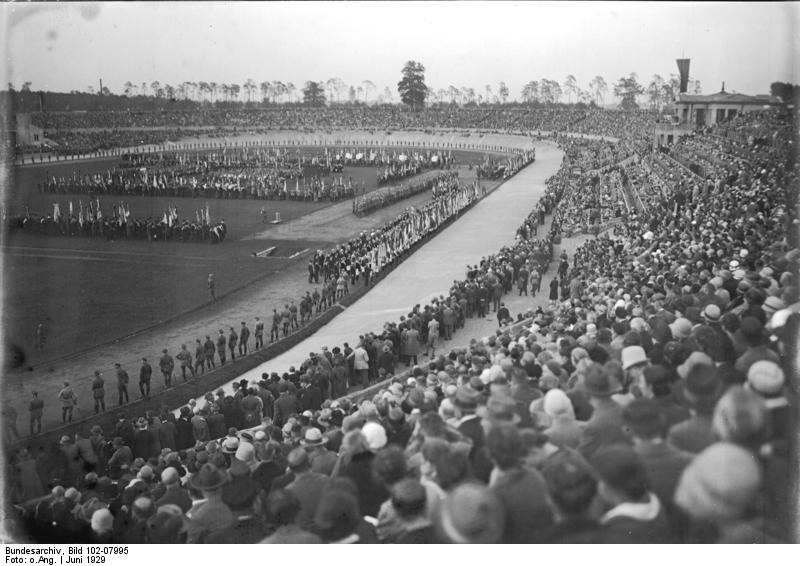 Die grosse Kundgebung 10 Jahre Versailles im Berliner Stadion! Über 50 tausend Menschen wohnten der Feier bei. Blick in das Stadion mit über 50 tausend Menschen während der Feier 10 Jahre Versailles.